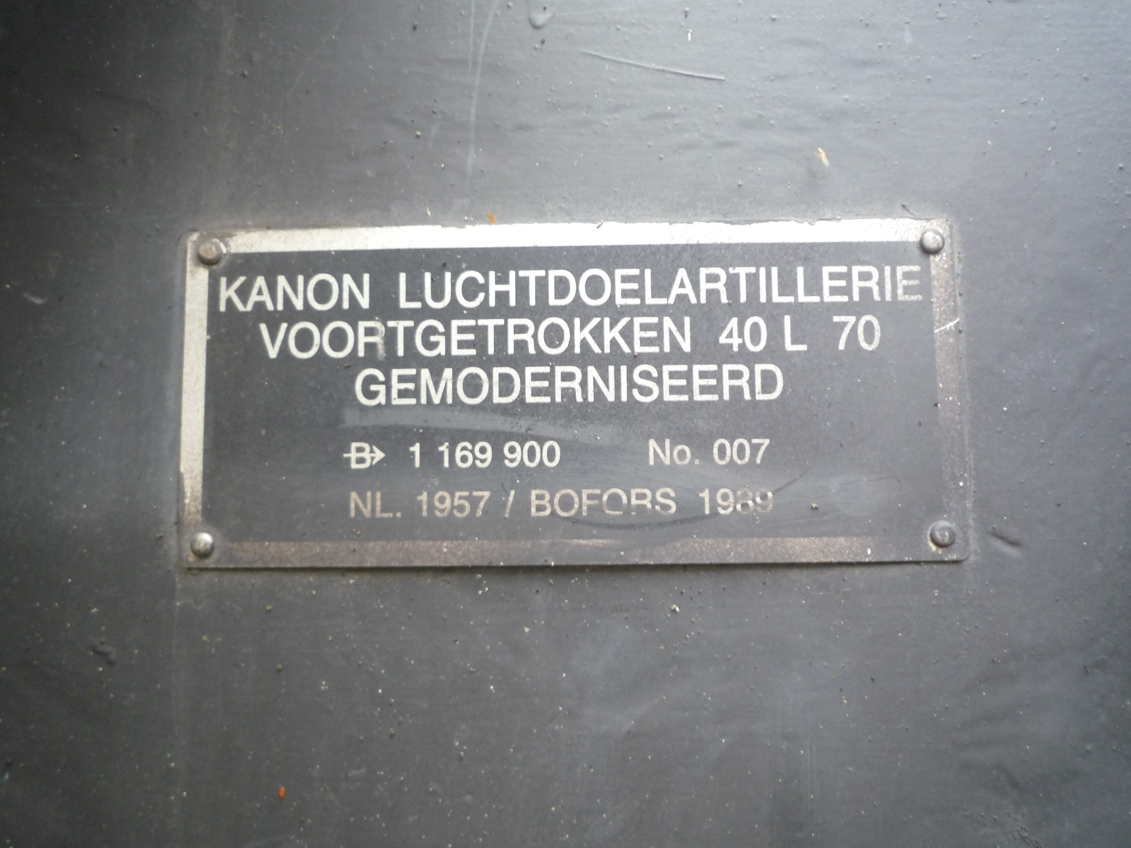 Typeaanduiding Kanon Luchtdoelartillerie Voortgetrokken 40L70 Gemodificeerd